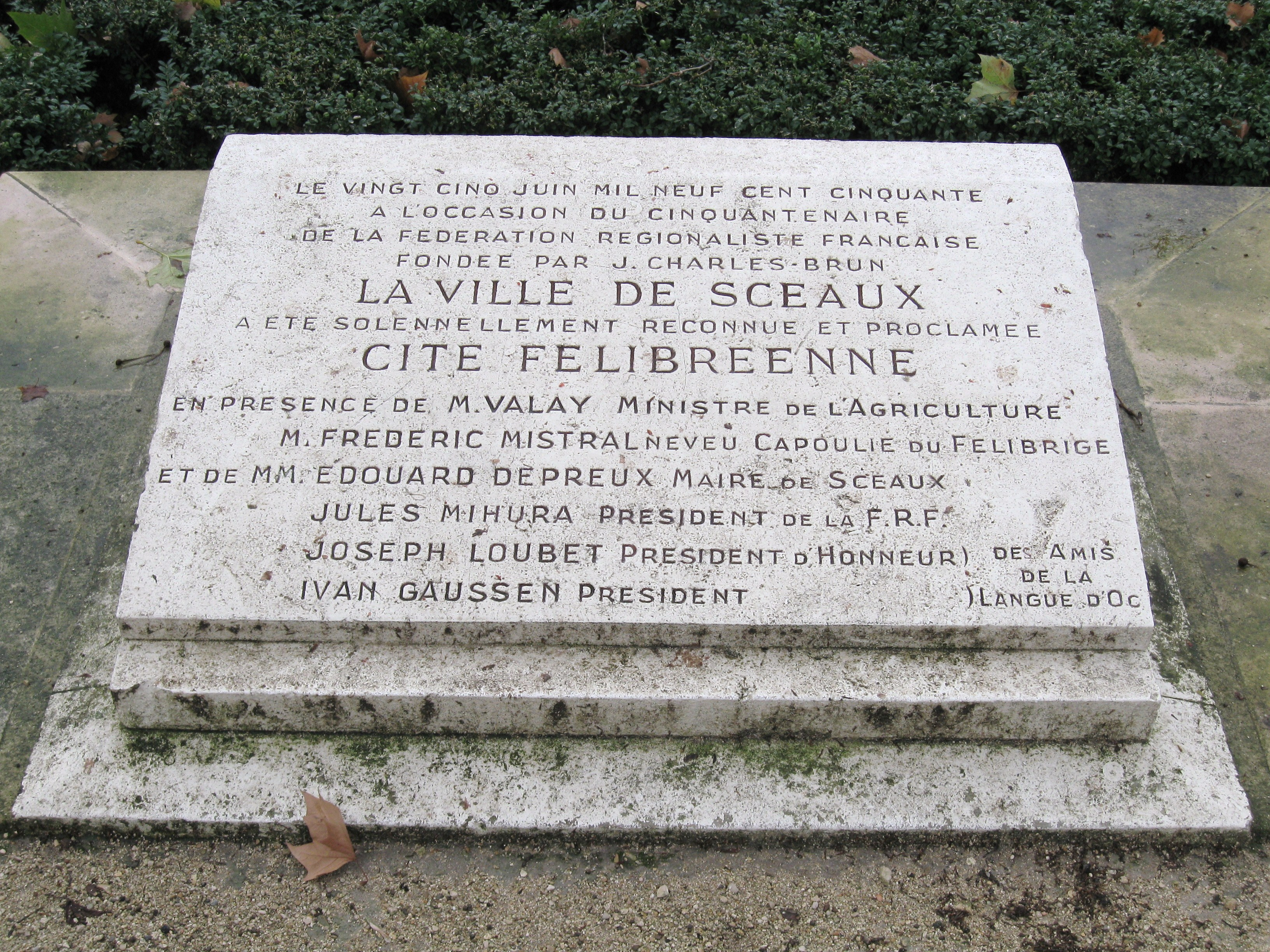 Jardin des Félibres, stèle commémorative, Sceaux, Hauts-de-Seine, France